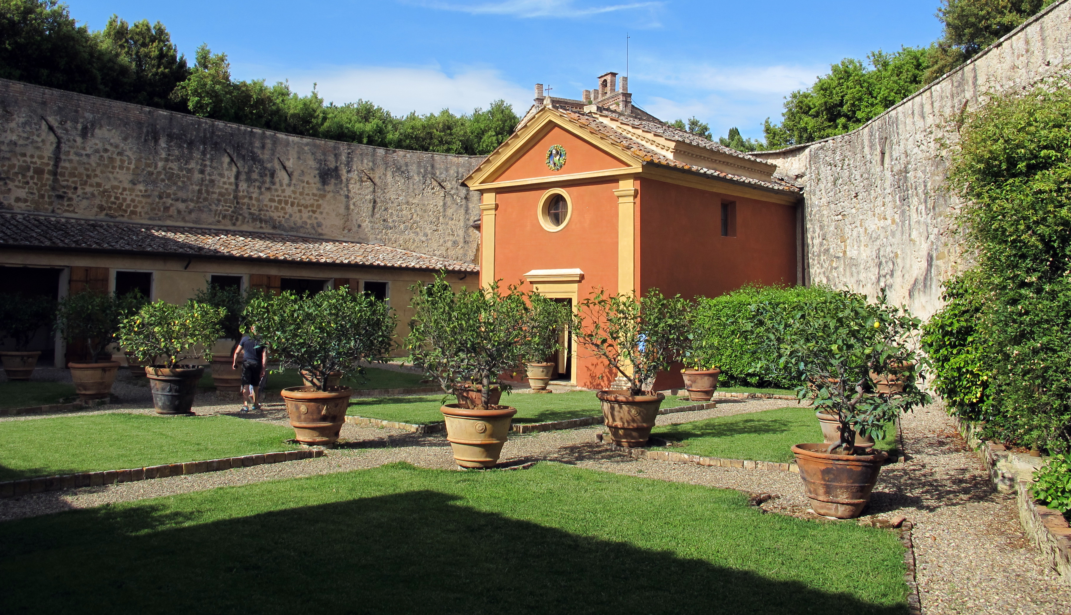 Castello di Belcaro - Cappella